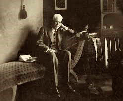 русский и советский хирург